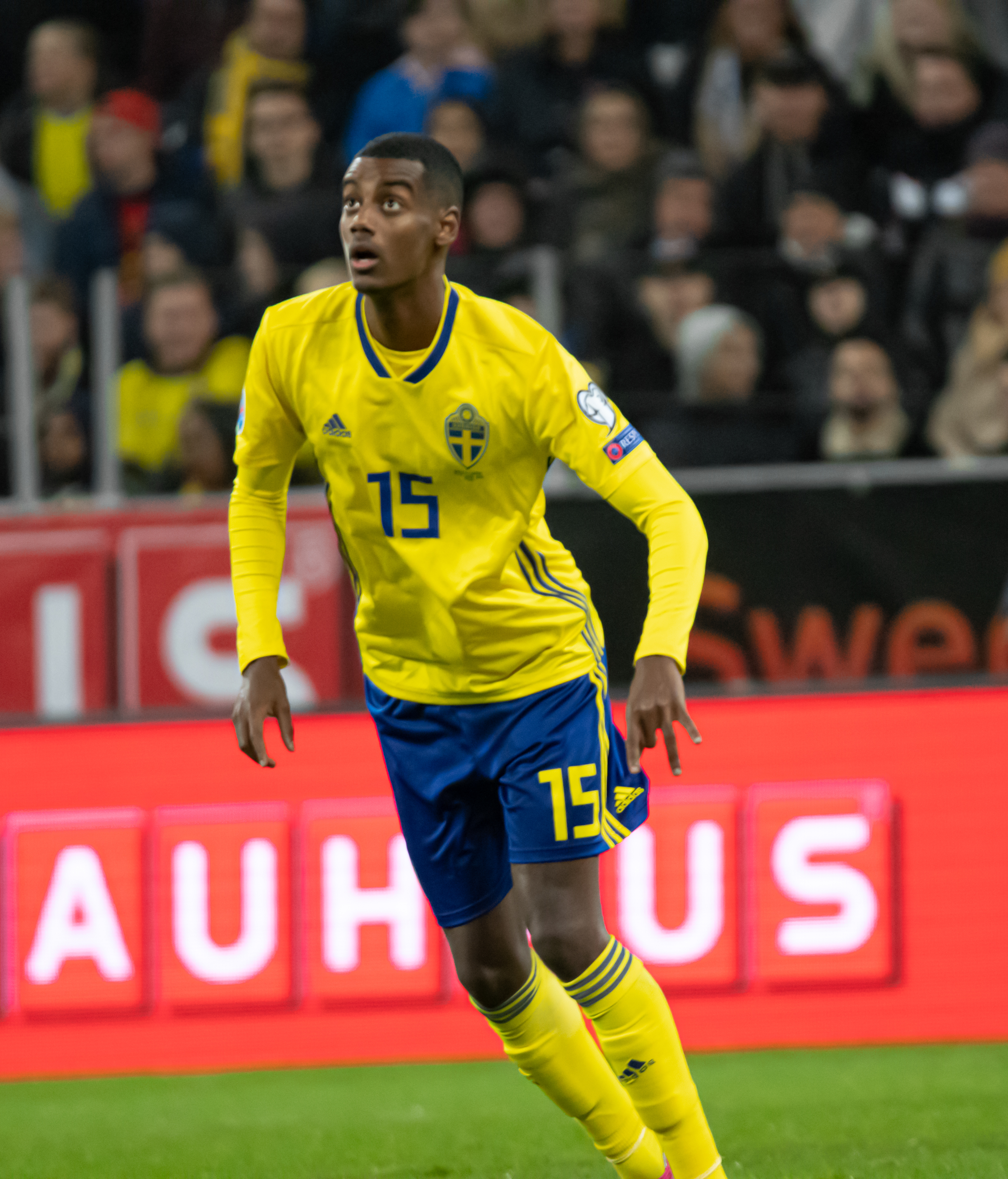 UEFA EURO qualifiers Sweden vs Spain 20191015